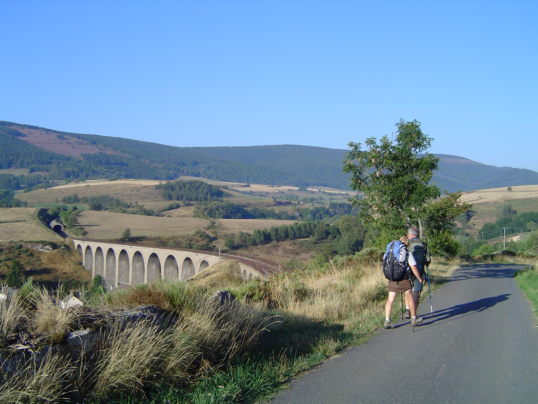 Sur le chemin de Stevenson près du viaduc de Mirandol au-dessus du Chassezac, commune de Chasseradès sur la montagne du Goulet.